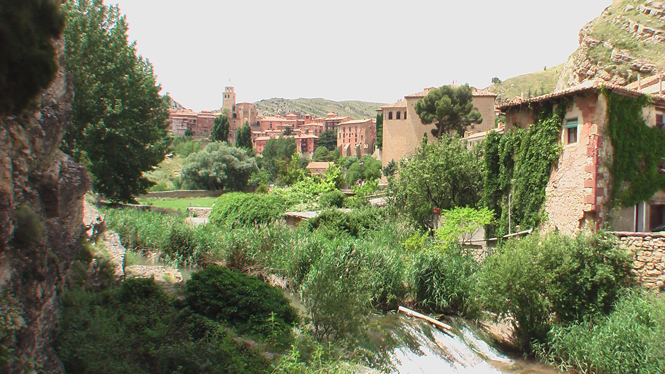 Ansicht von Albarracin